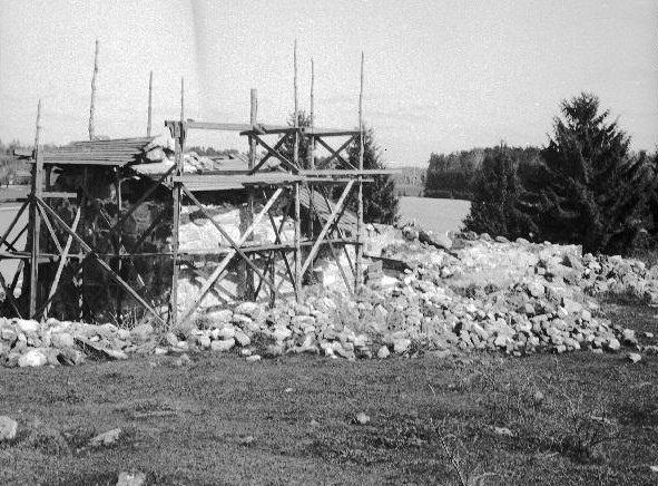 Hölö, Överhölö kyrkoruin, restaurering